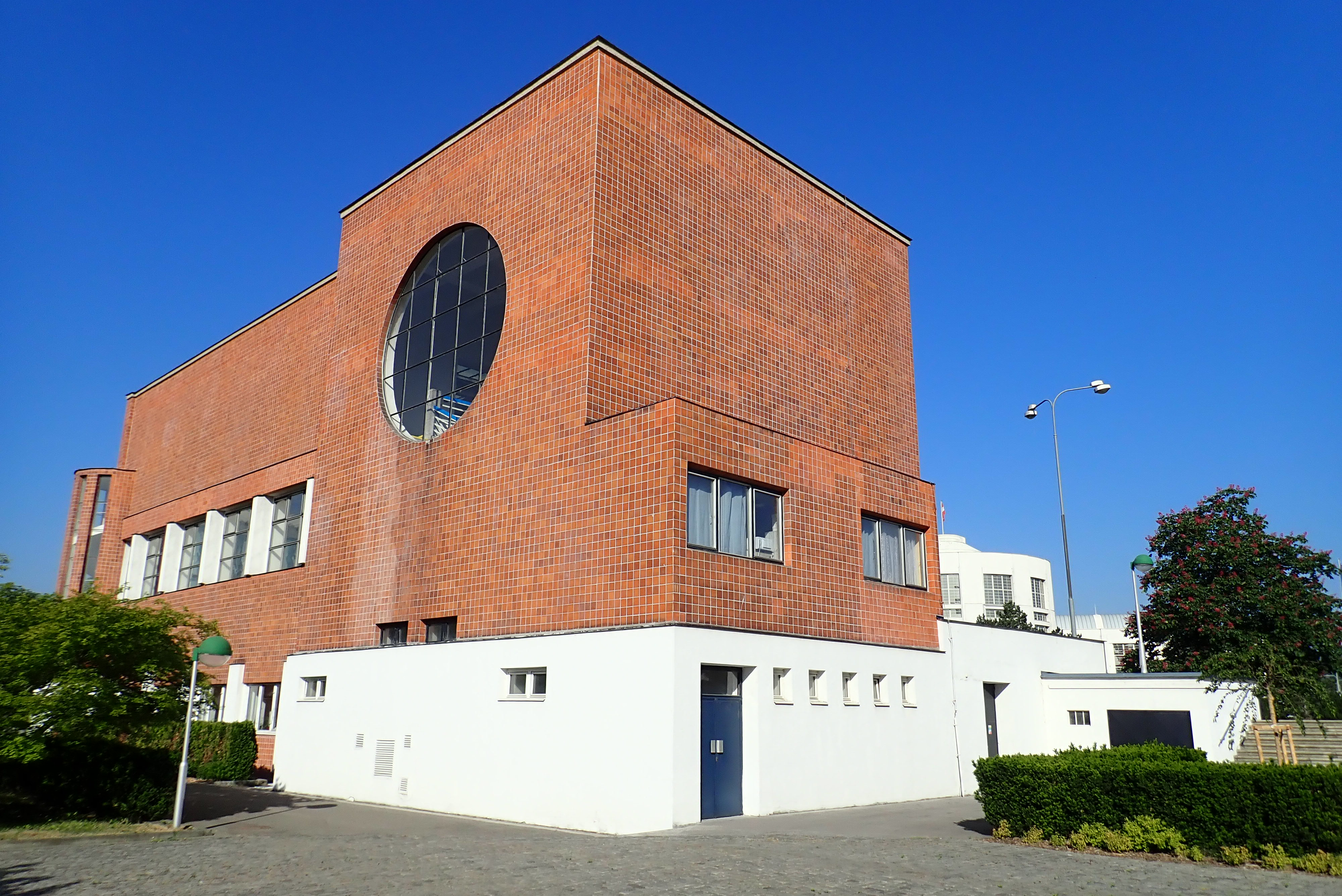 Pavilon Morava/pavilon země Moravské